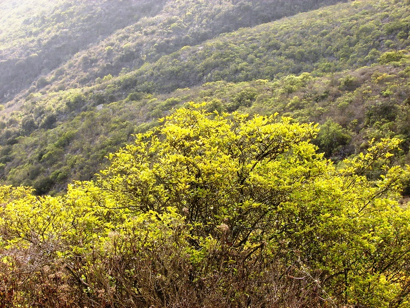 Azara celastrina, otoño en el cerro Talinay, al sur de Huentelauquén, región de Coquimbo.